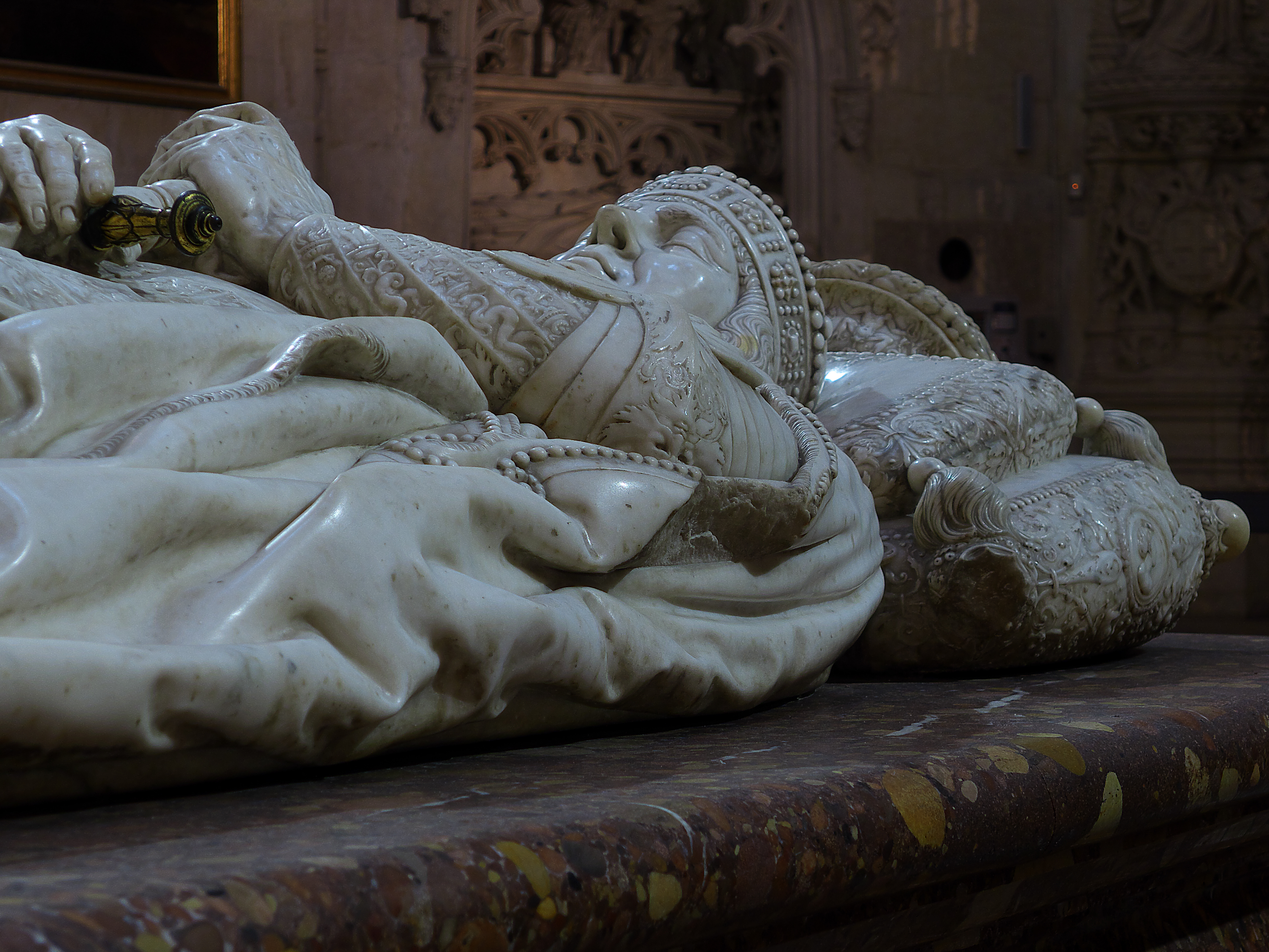 Pormenor del sepulcro de Pedro Fernández de Velasco y Manrique de Lara, Condestable de Castilla. Capilla del Condestable, Catedral de Burgos. Obra maestra de la escultura funeraria, Felipe Vigarny (1526-1528)